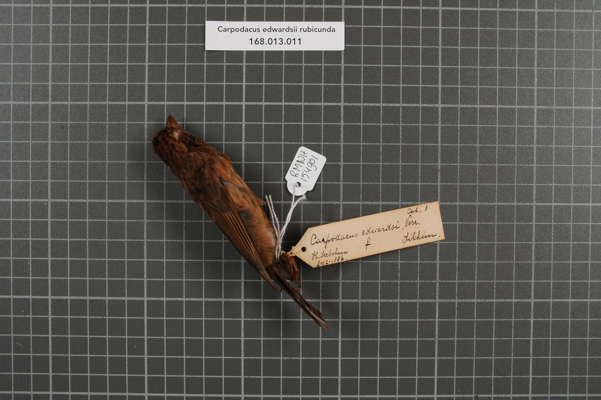 Carpodacus edwardsii rubicunda (Greenway, 1872)